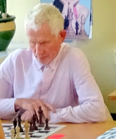 Tarptautinis šachmatų meistras Kęstutis Kaunas 14-ame Klaipėdos tarptautiniame šachmatų festivalyje "Jūros šventė 2017"